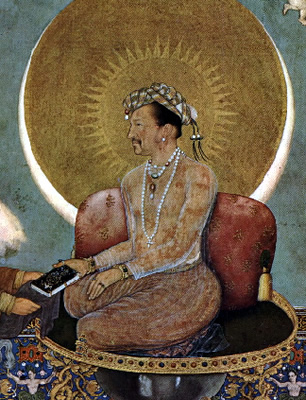 Der Großmogul Jahangir (* 1569 /† 1627) in einer Darstellung von ca. 1620.